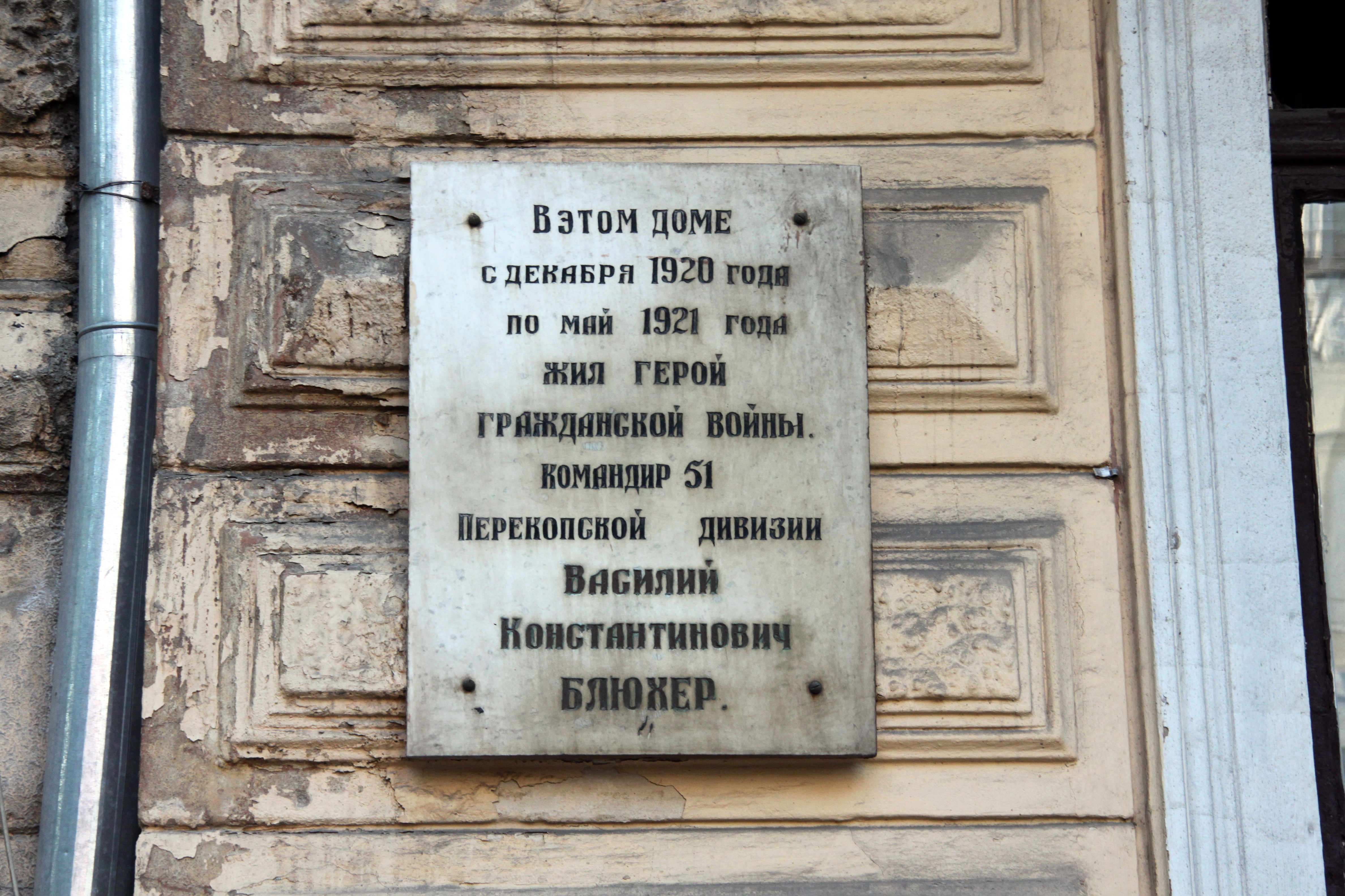 Будинок прибутковий О.П. Абомеліка, в якому жили: - В.К. Блюхер – командир 51-ї Перекопської дивізії; - М.Д. Пільчиков – фізик, винахідник сейсмографу, Маяковського пров., 4, Одеса